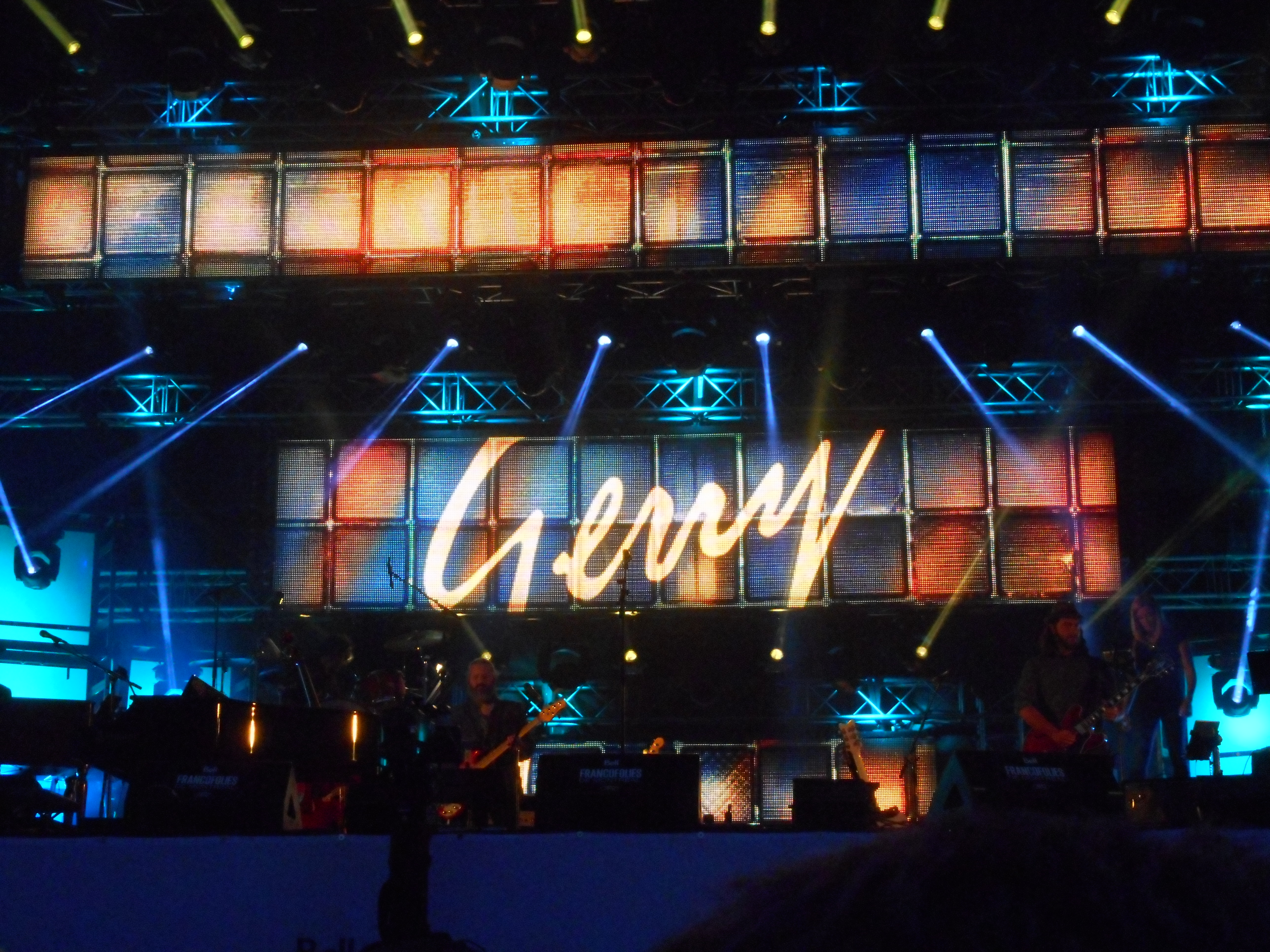 À grands coups d’amour pour Gerry : 25 ans plus tard, place des Festival